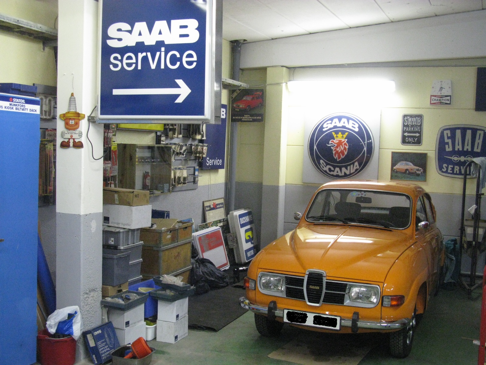 Saab 96 V4